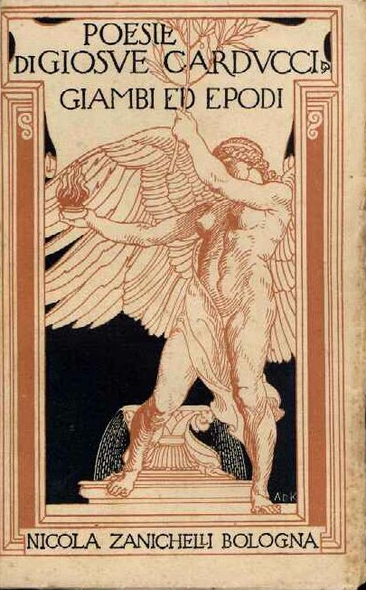 Giosue Carducci, Giambi ed Epodi, 1921 Zanichelli